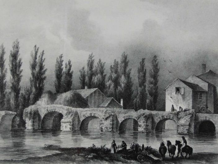 Une lithographie du milieu du XIXème siècle, représentant le pont des vendéens, largement abîmé après la révolution. Il est aujourd'hui au centre du quartier de Pontlieue.